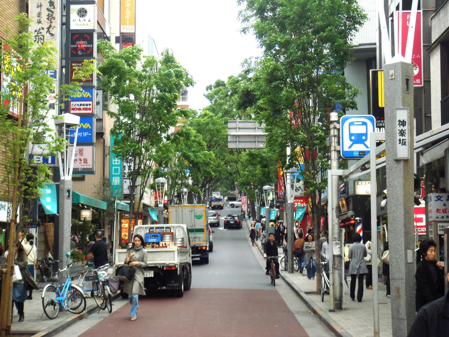 Street of Kagurazaka, Tokyo, Japan